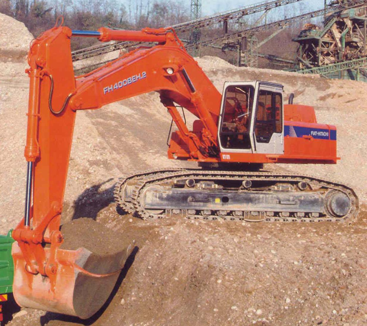 Escavatore Fiat FH400BEH